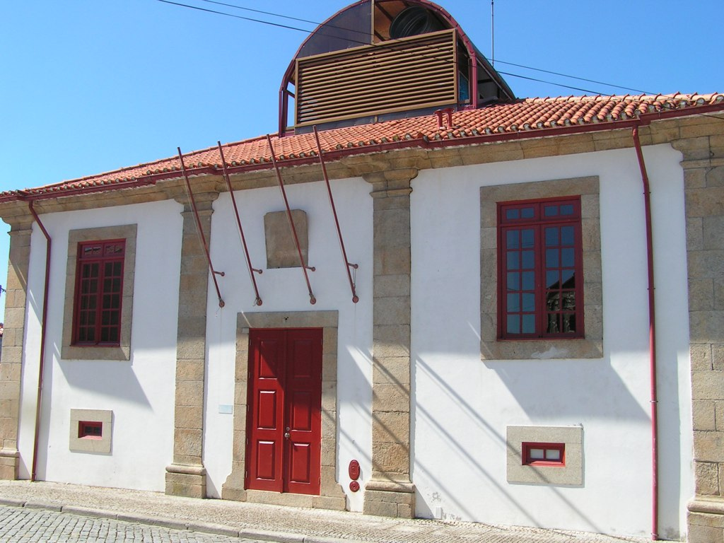 Fachada principal